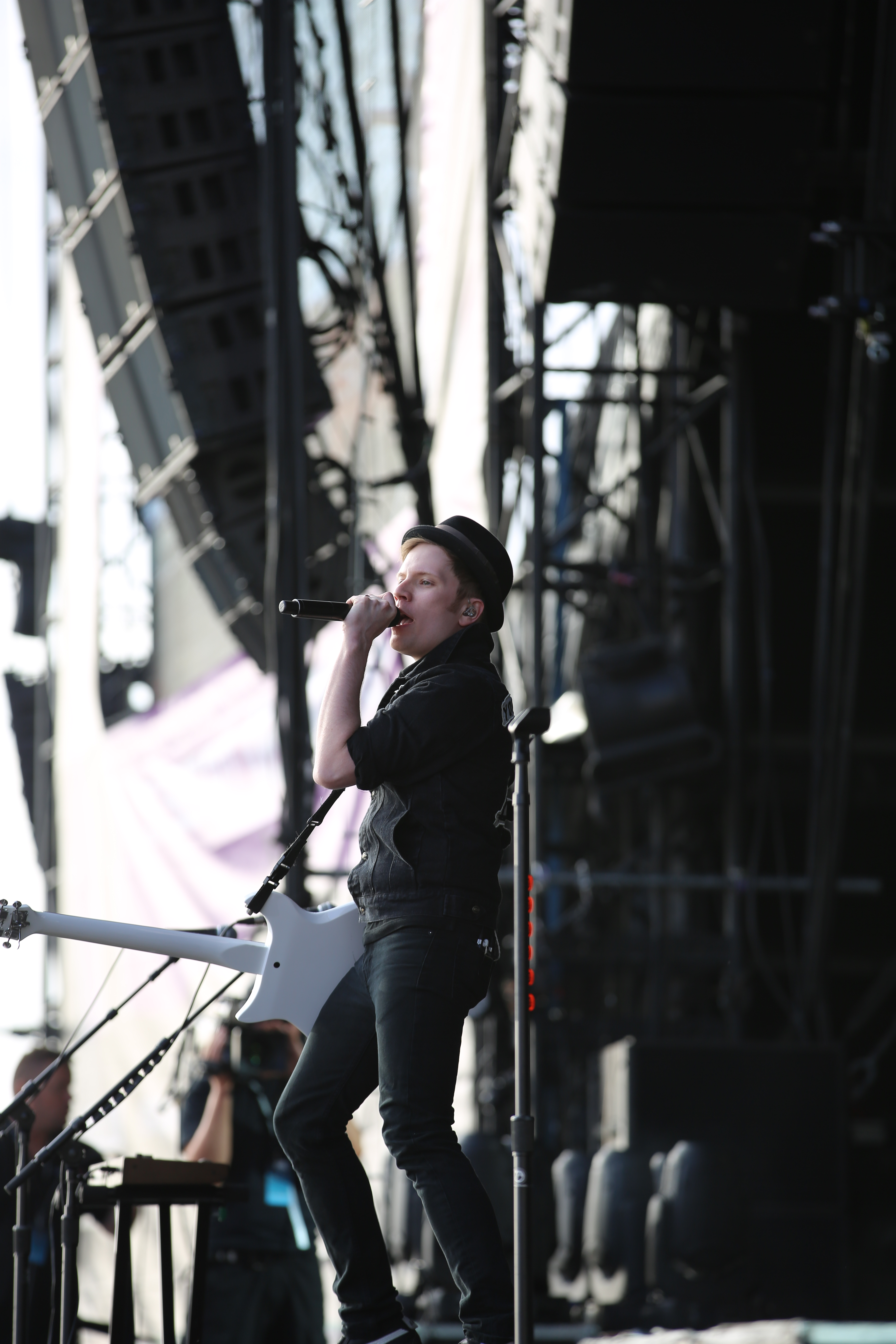 Fall Out Boy bei Rock am Ring 2014.